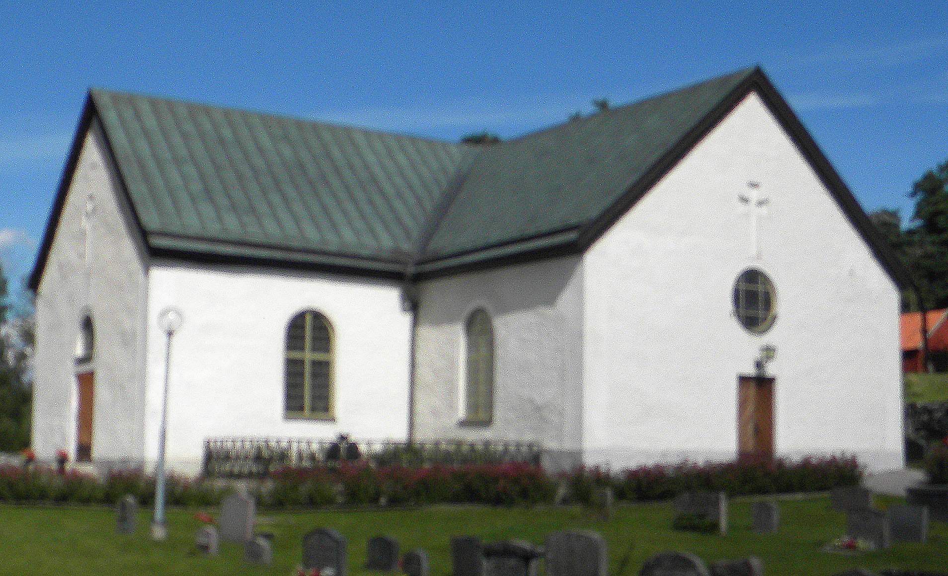 Barva kyrka